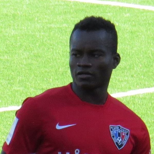 Vincent Onovo, nigerialainen jalkapalloilija FC Inter Turun joukkueessa kaudella 2015.